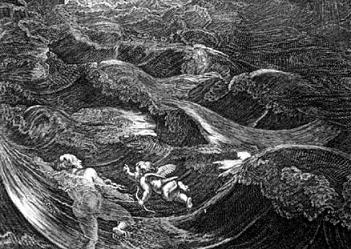 Leandro nadando a través del Helesponto. Detalle de una pintura de Bernard Picart.